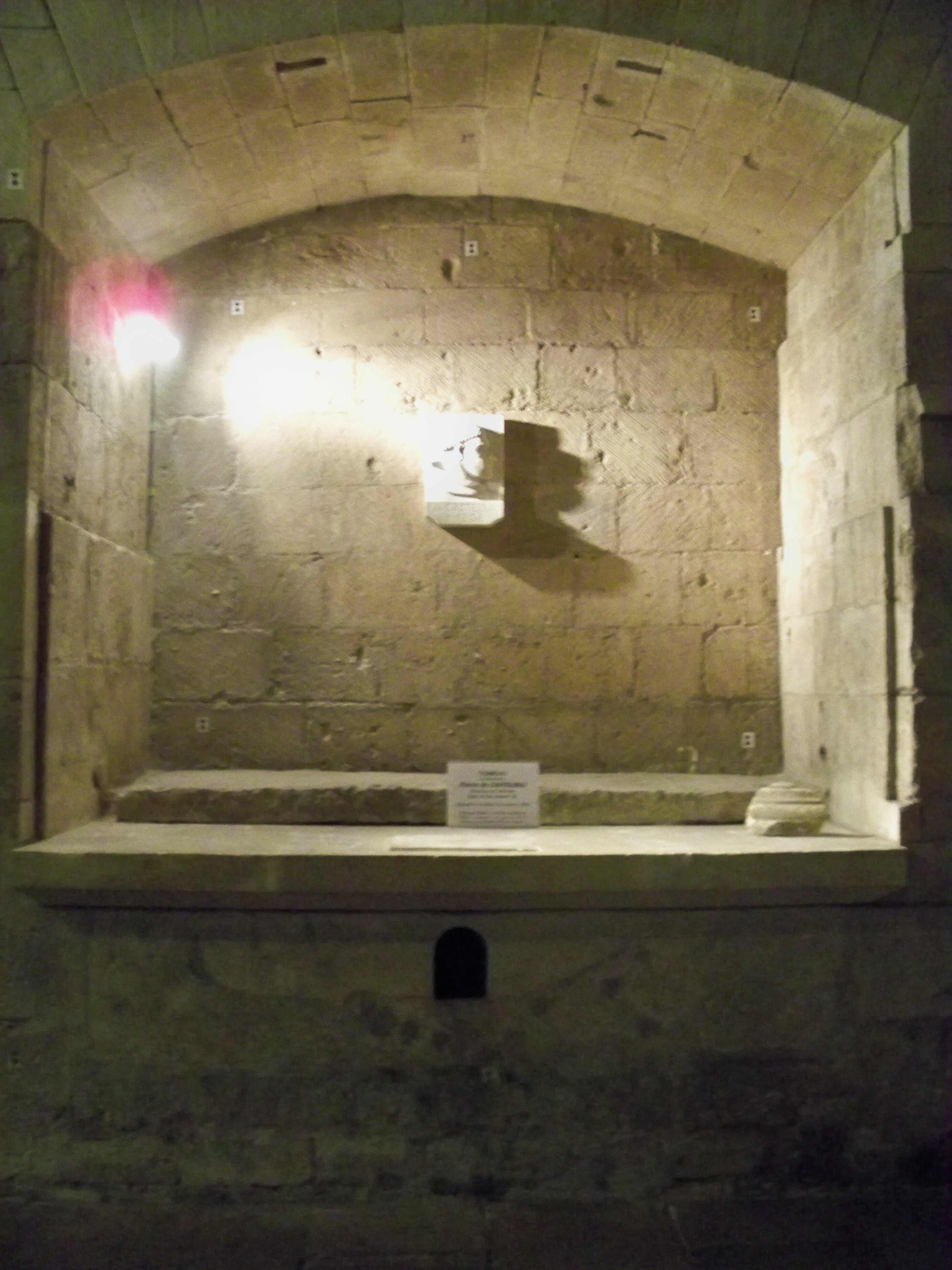 Tombeau de Pierre de Castelnau, dans l'abbatiale de Saint Gilles (30)